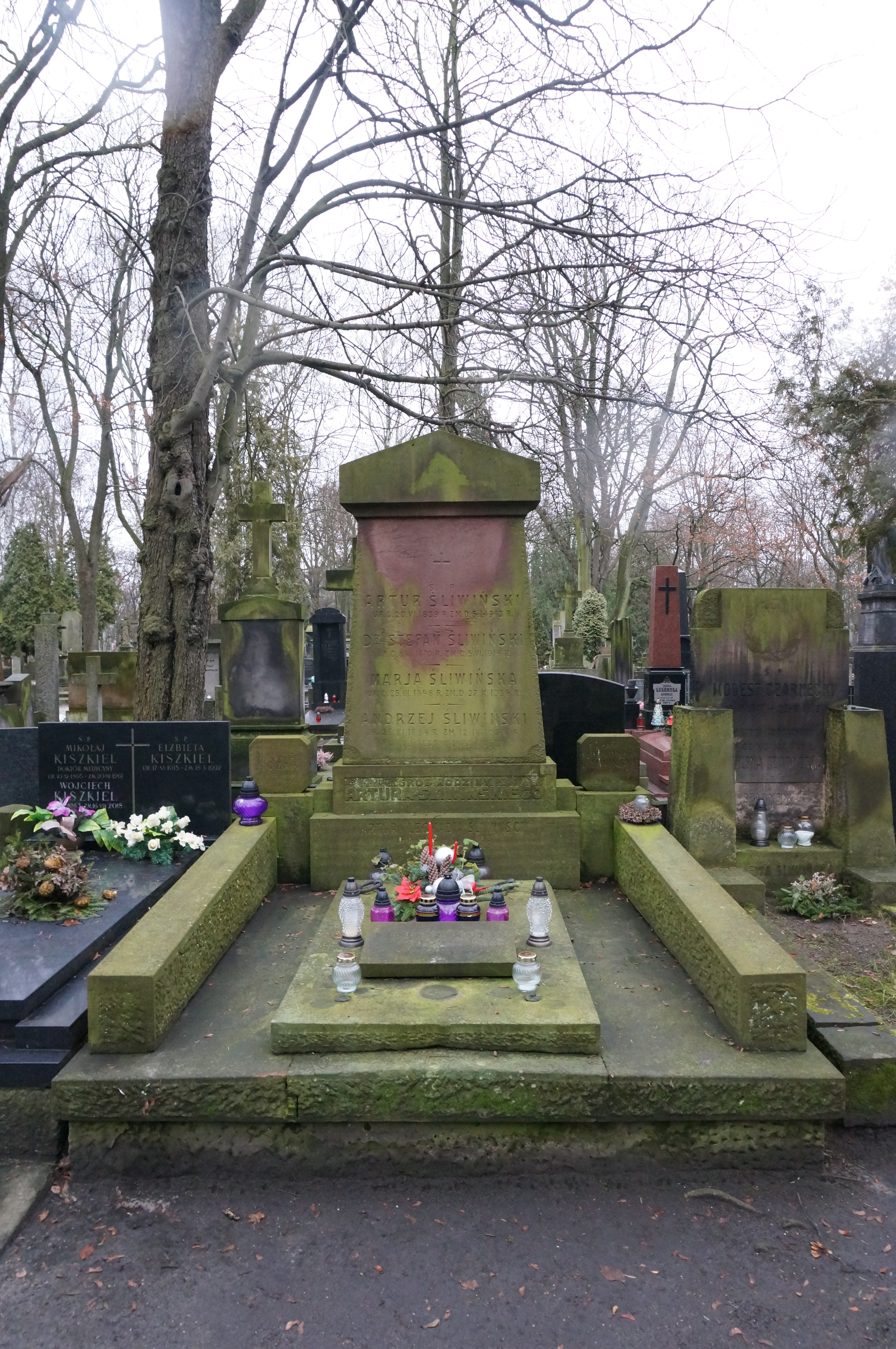 Grób Artura Śliwińskiego na Cmentarzu Powązkowskim (kwatera 50, rząd 6, grób 6, 7)